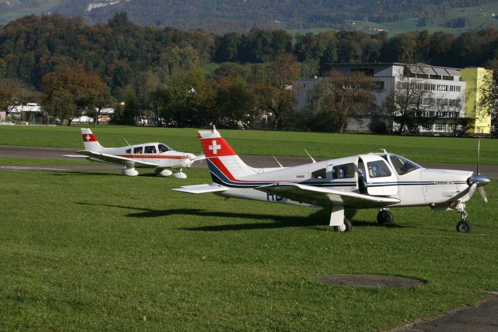 Piper PA-28R-201 Arrow III [HB-PDC] (rechts) und Piper PA-28-161 Warrior II [HB-PNG] (links) auf dem Flugplatz Kägiswil, Kanton Obwalden, Schweiz